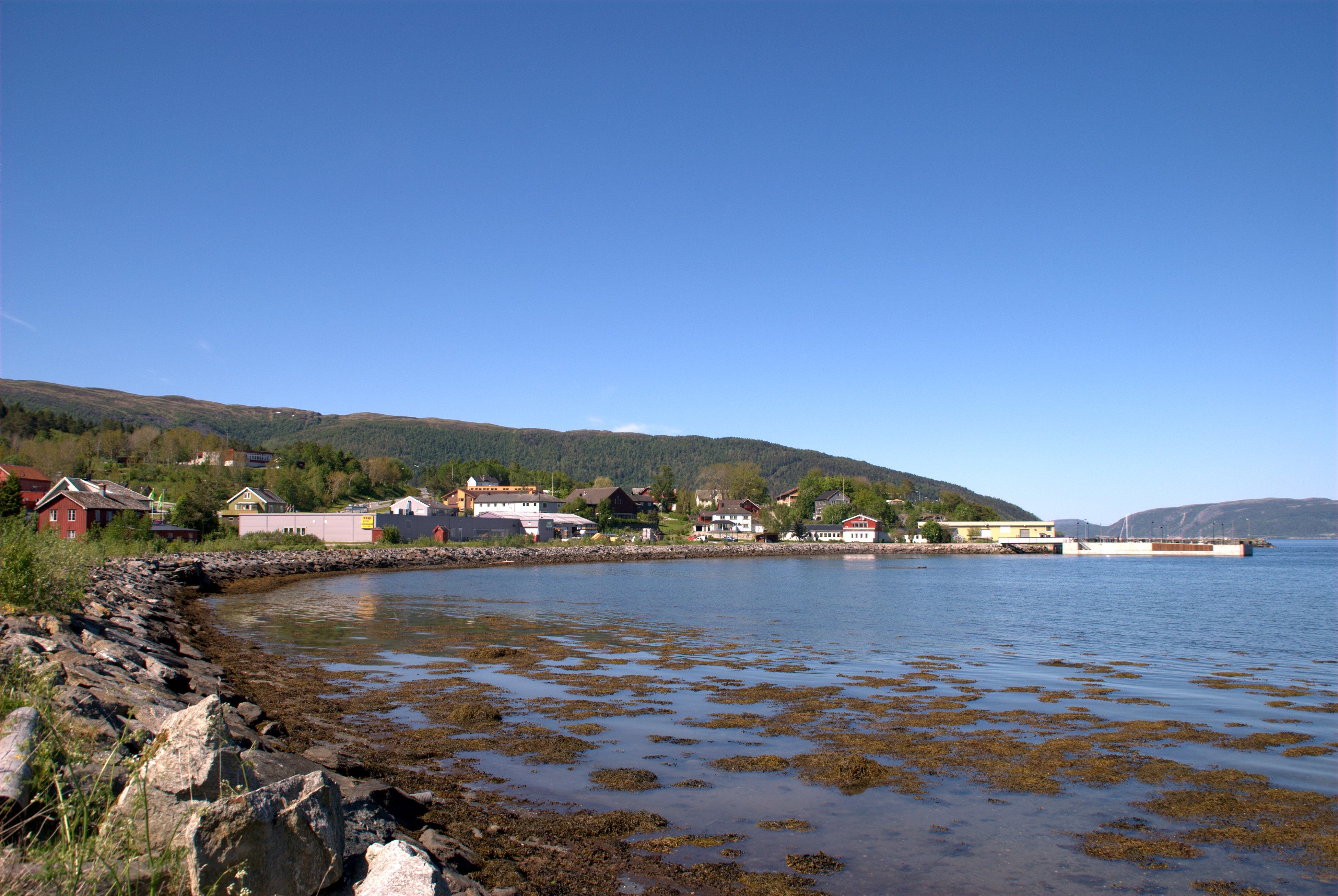 Lensvika i Agdenes i Sør-Trøndelag sett fra sjøsiden.